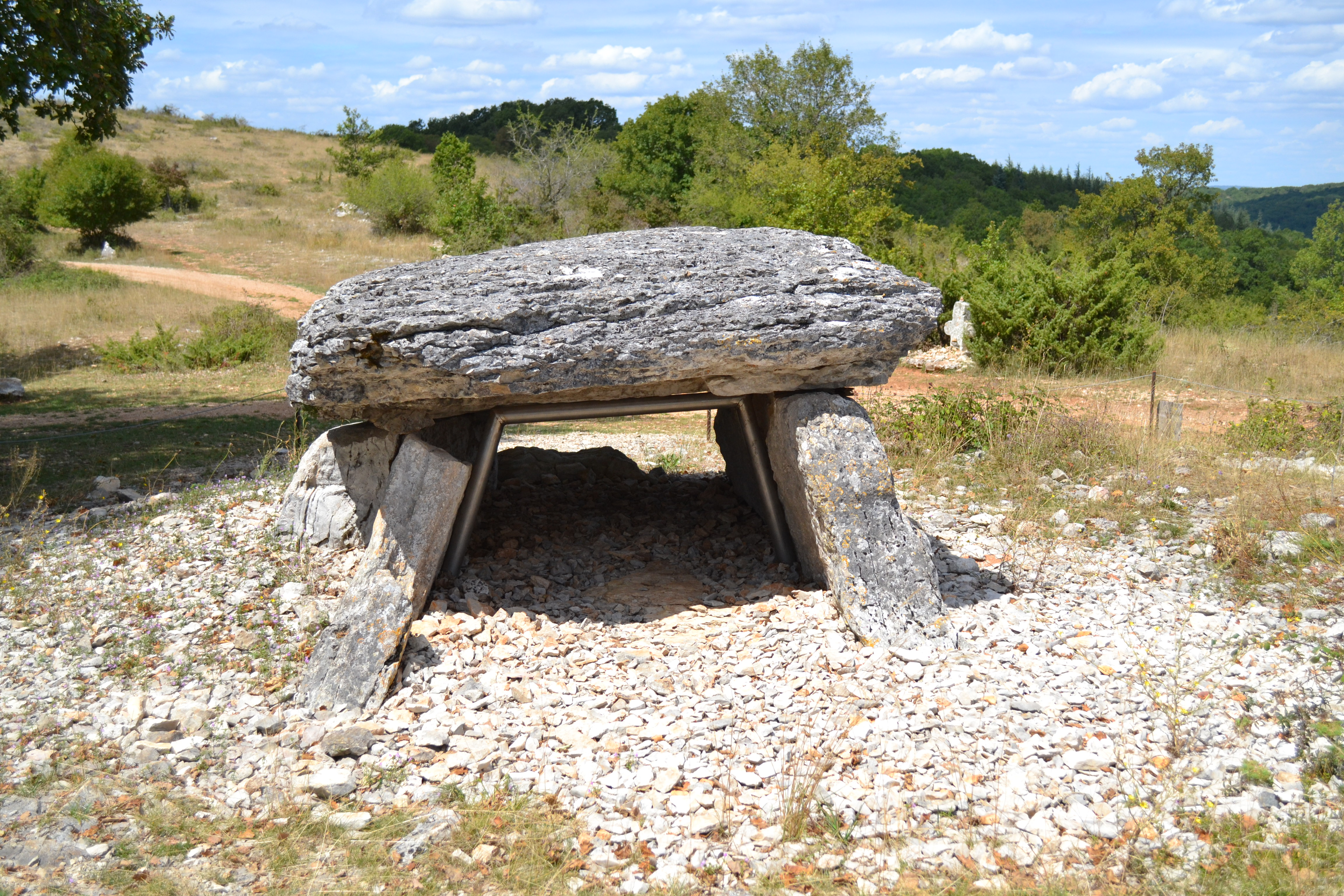 Dolmen 2, Pech Laglayre, Gréalou, Lot, France